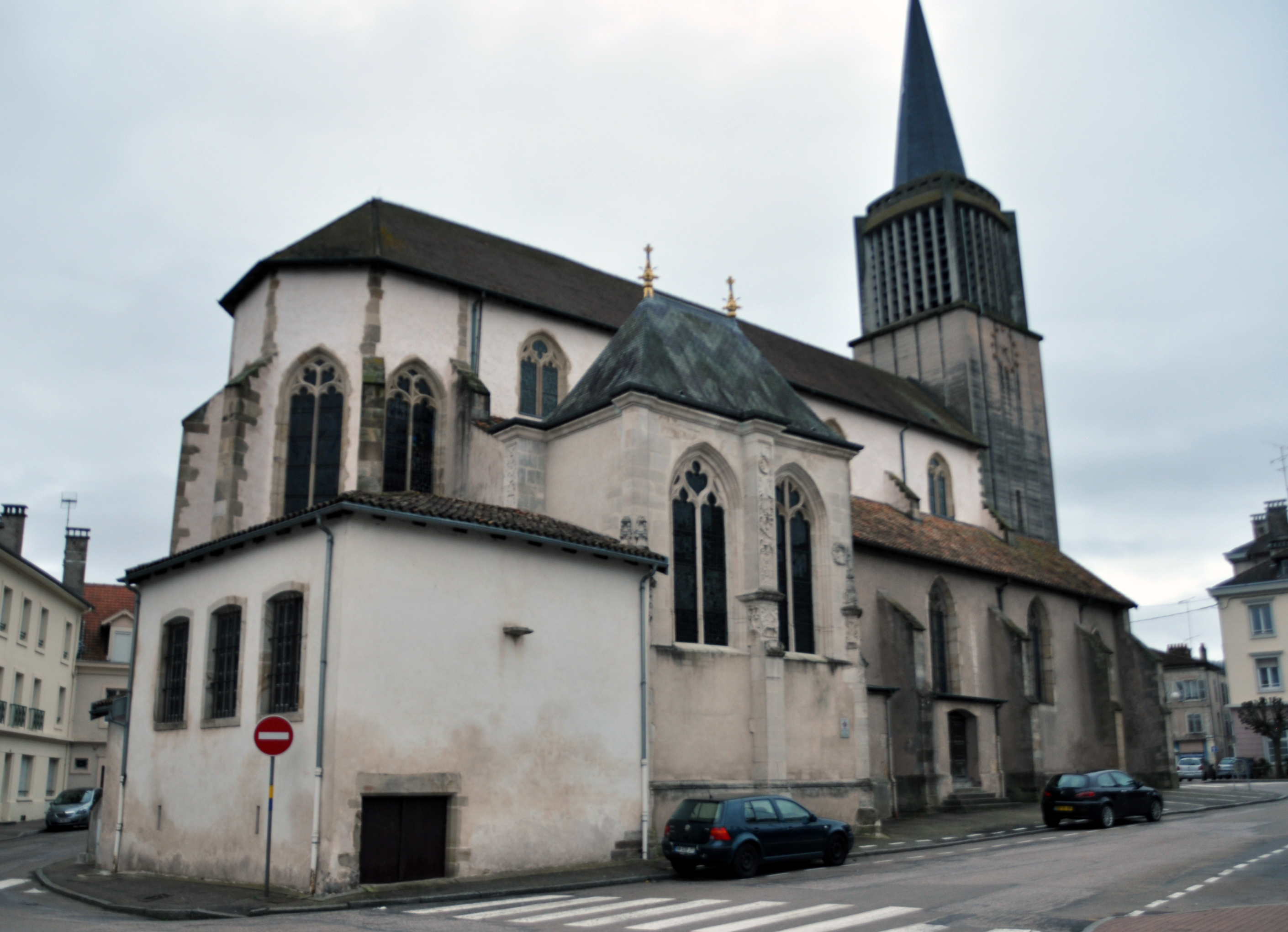 Charmes - église Saint-Nicolas